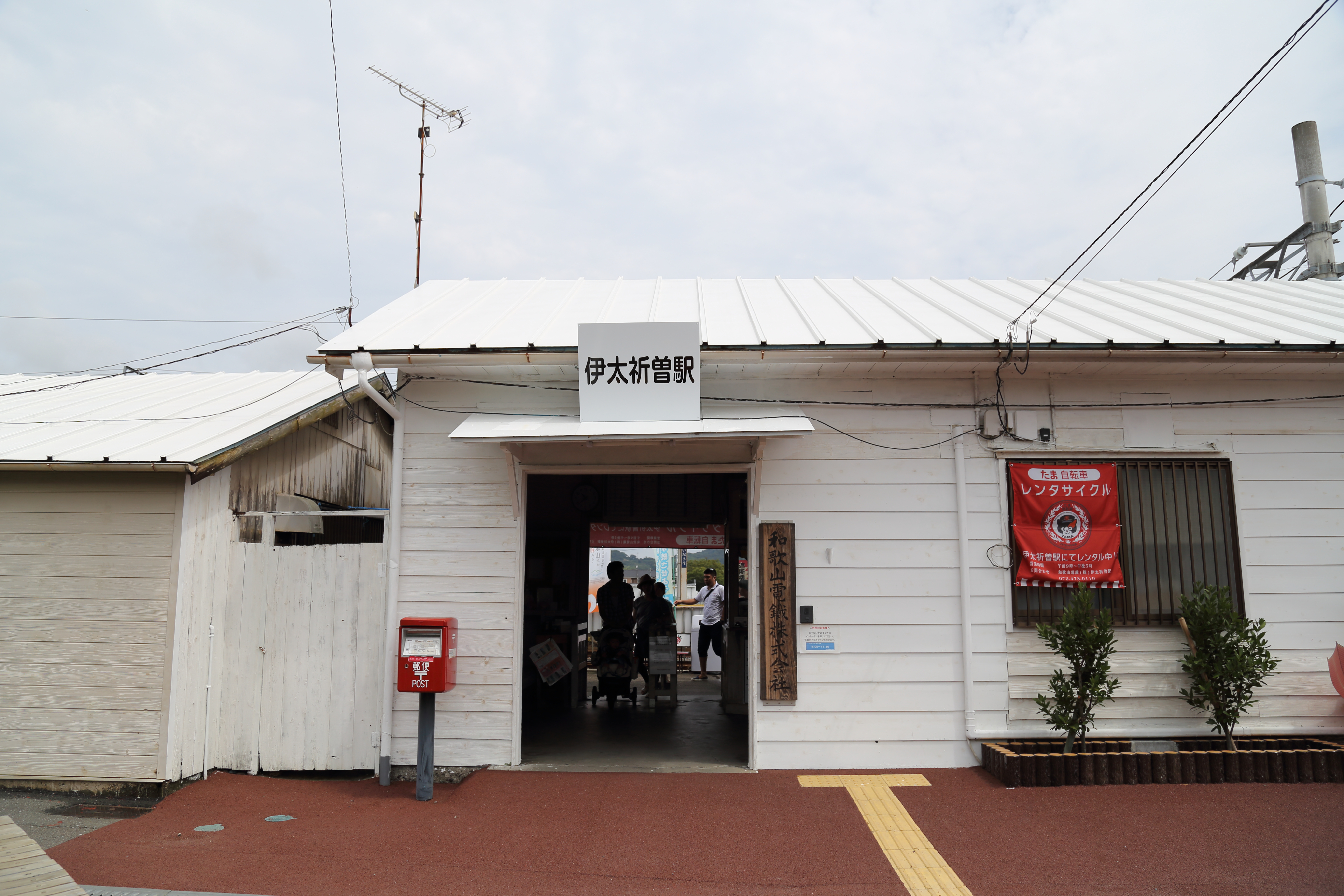 伊太祈曽